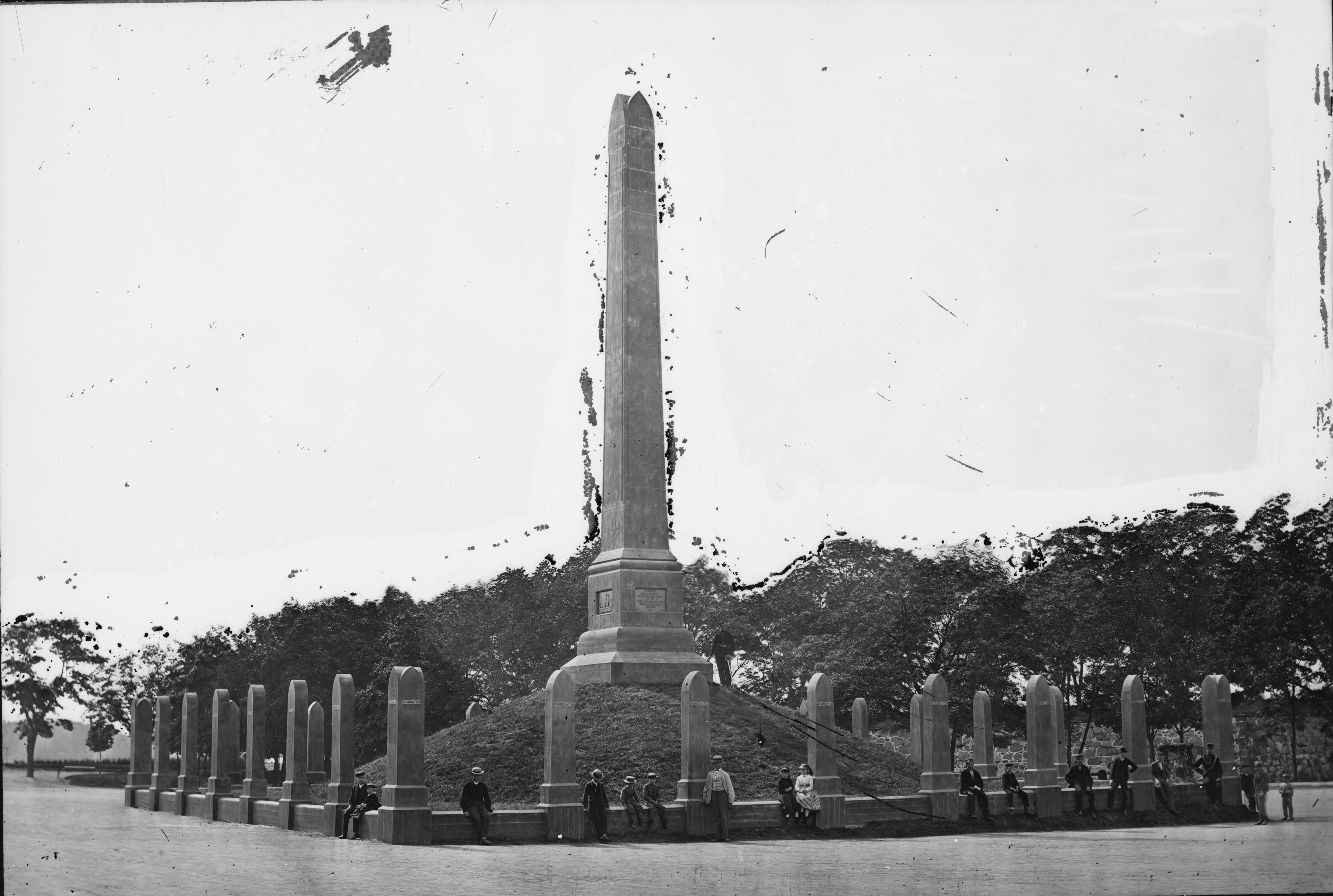 Sted: Gard,Haugesund Kommune: Haugesund Fylke: Rogaland Tagger